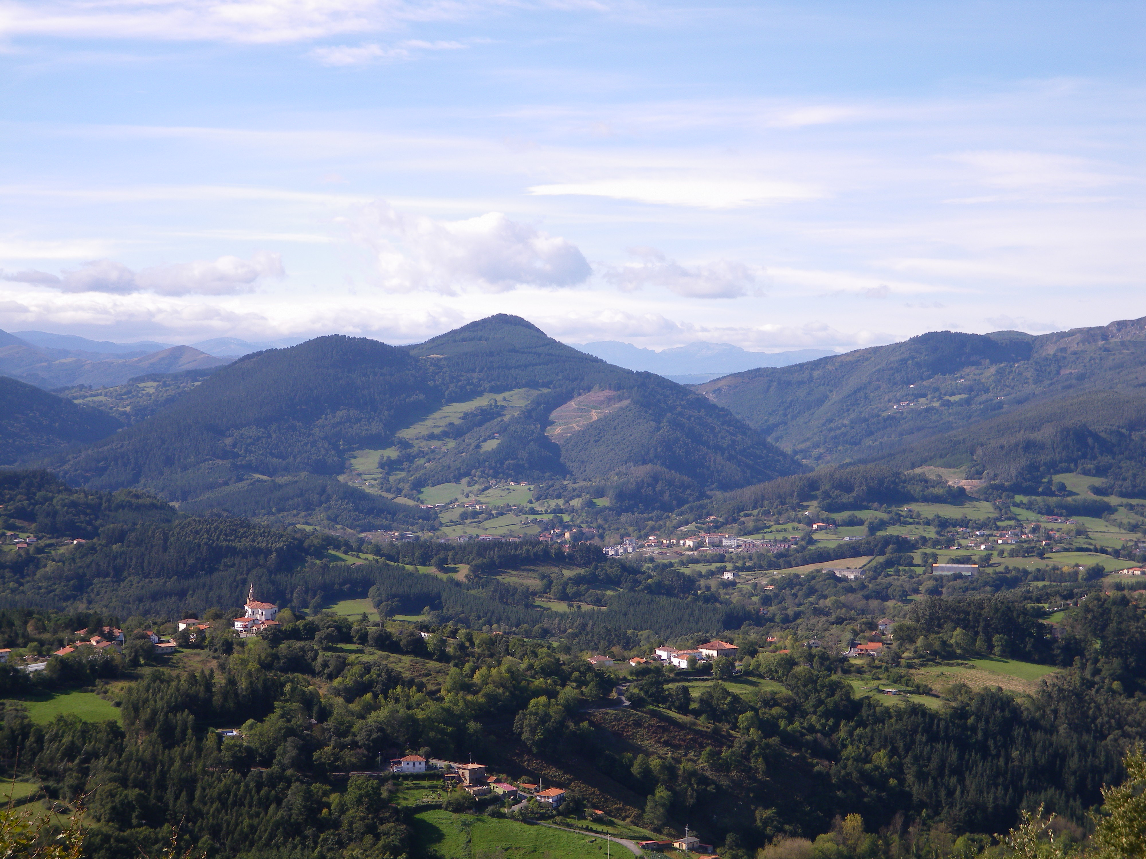 Longitas mendia, Bizkaiko Enkarterrietan.